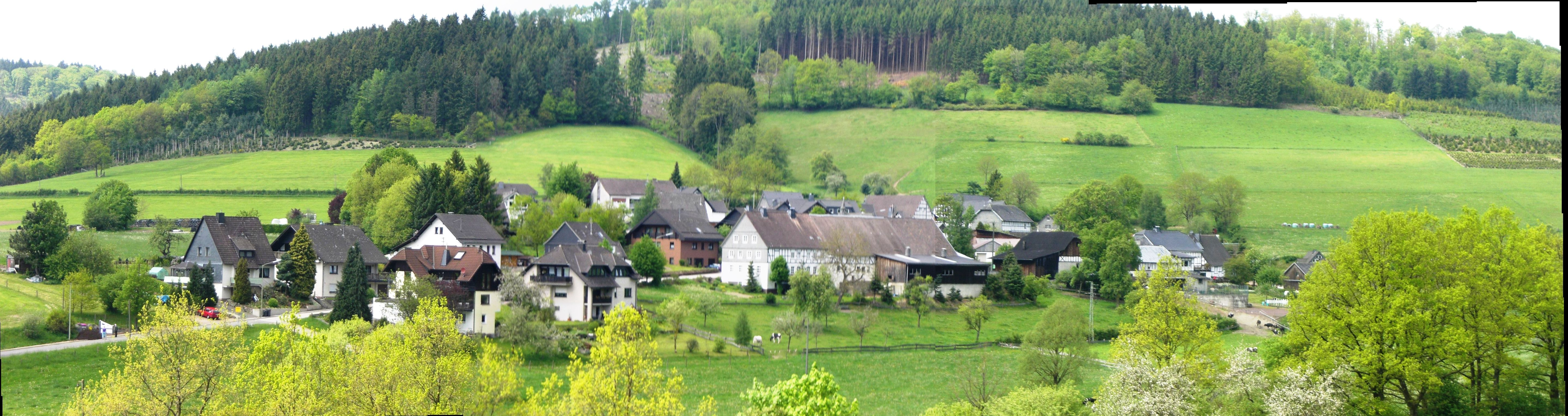 Blick auf Altenvalbert von der Egge